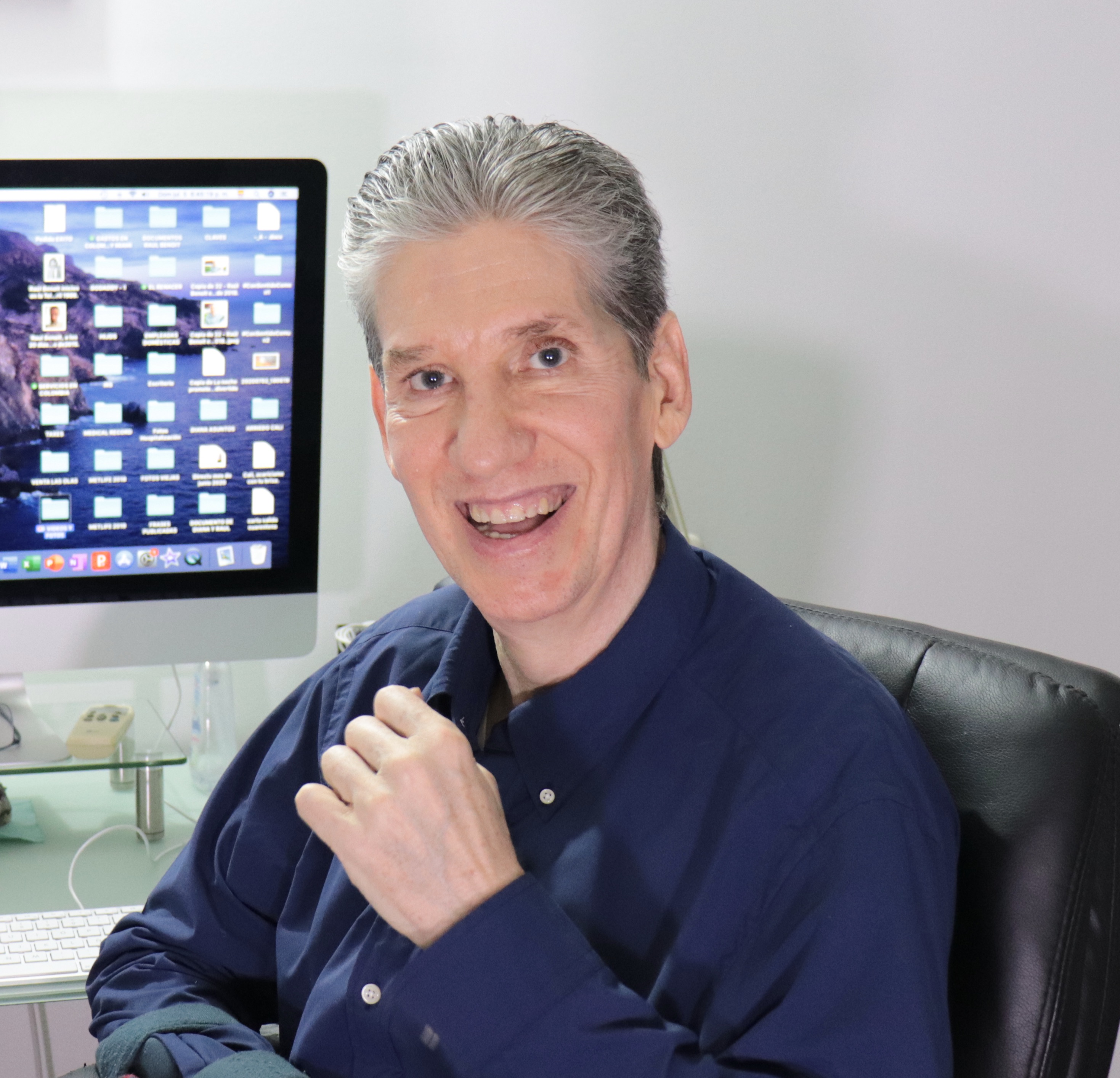 Raúl Benoit en la actualidad